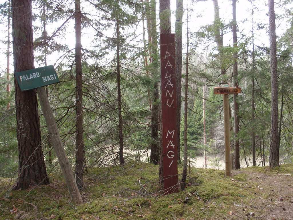 Palanumägi